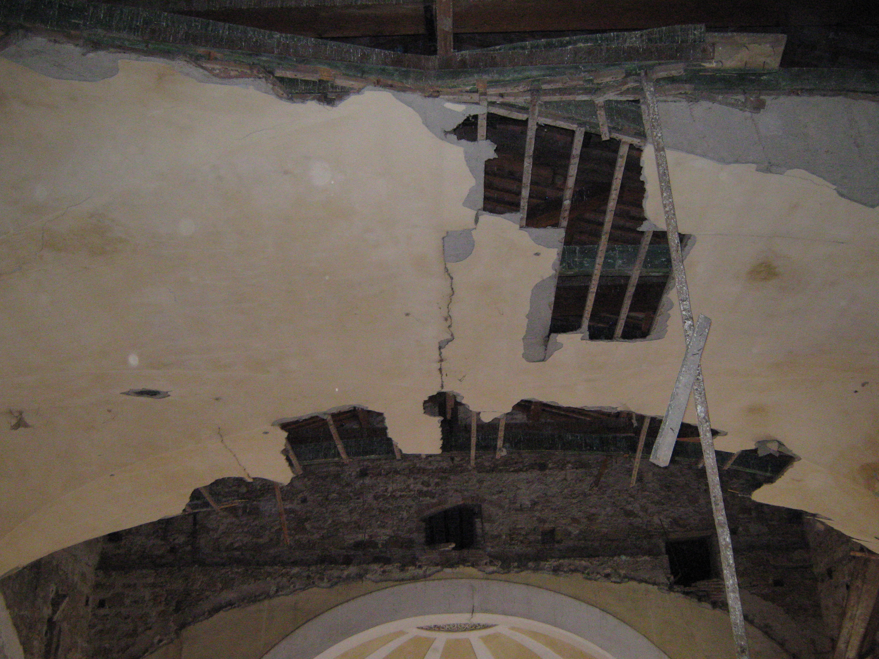 Controsoffitto del tempio della Congregazione Olandese-Alemanna, Livorno